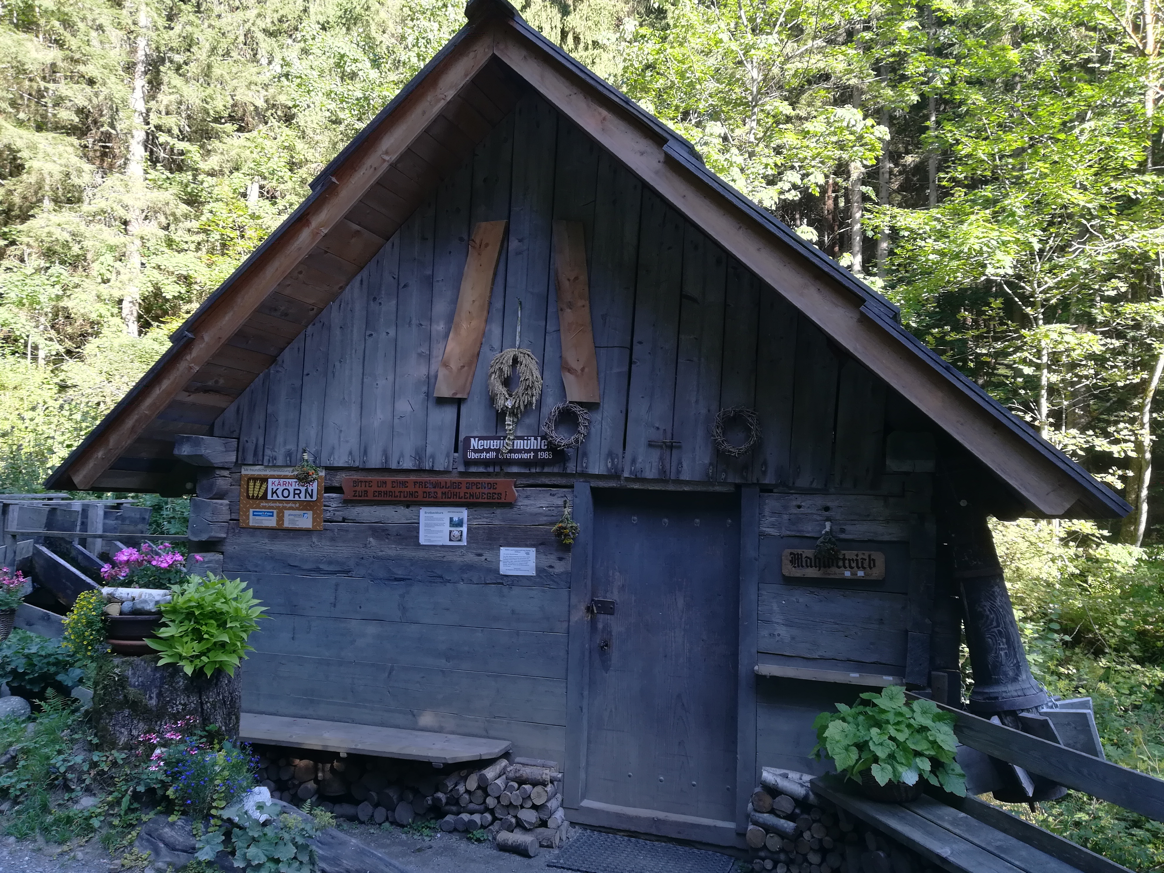 Neuwirtmühle in Kaning bzw. am Kaninger Mühlenwanderweg. 1983 renoviert.